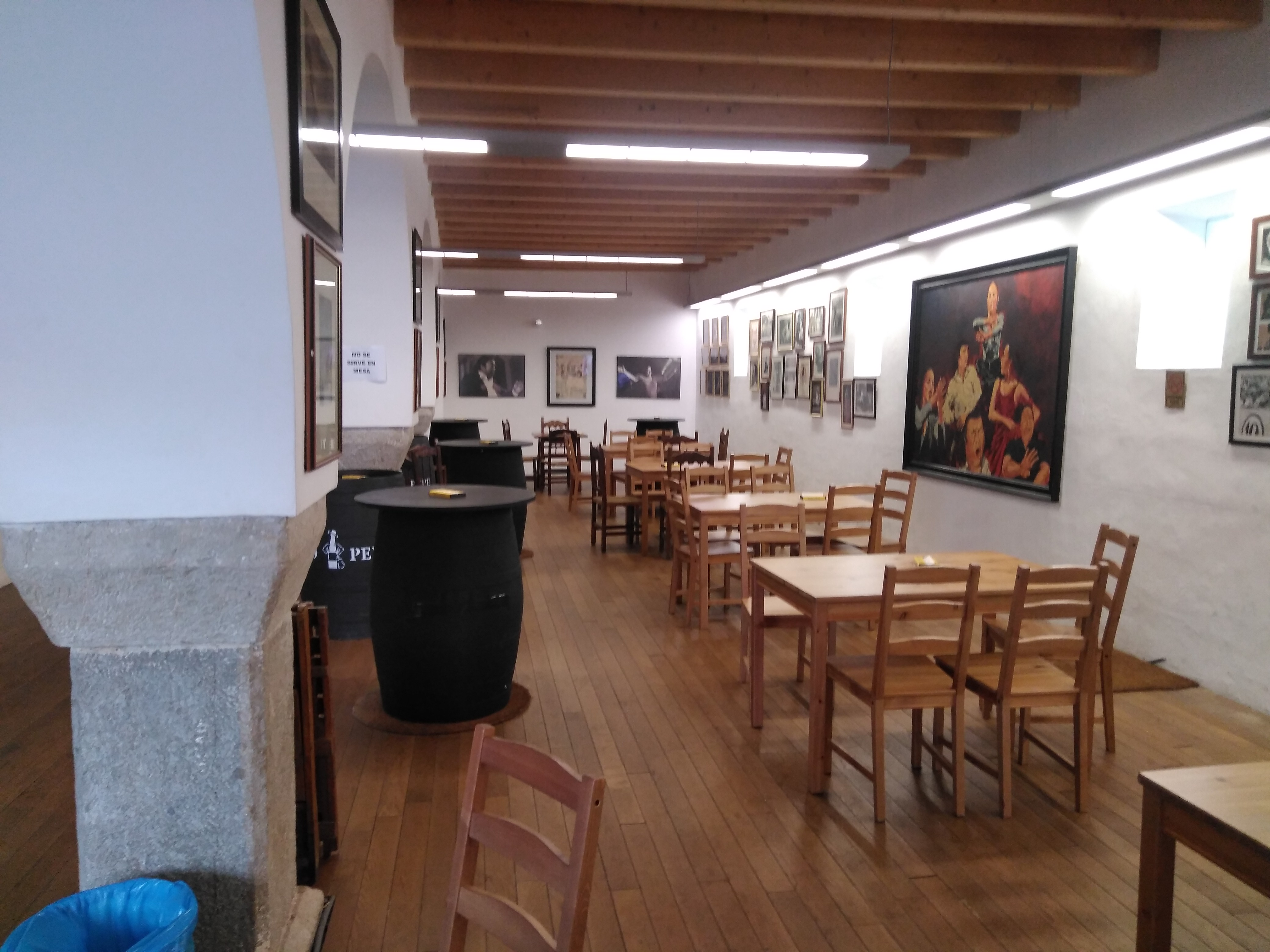 Interior de la Peña Flamenca "La Buena Gente", Nave del Aceite - Plaza de Belén en Jerez de la Frontera (España)